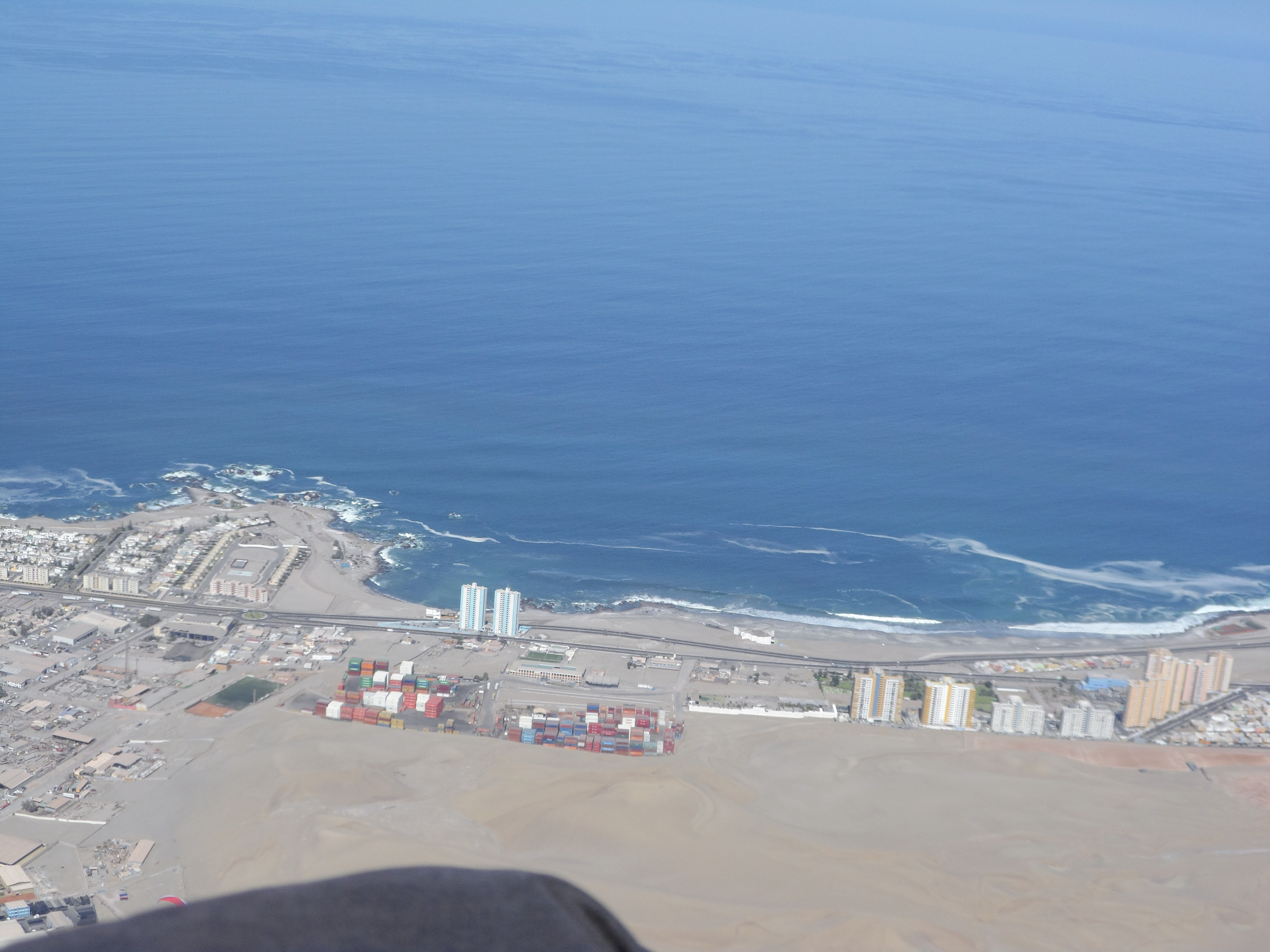 Vista Playa Brava desde vuelo en parapente. Iquique. I región.